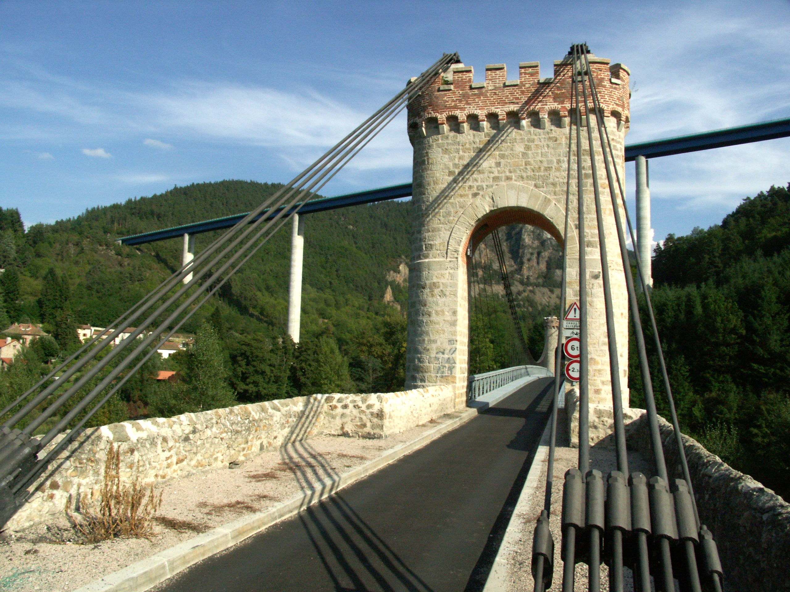 Deux ouvrages d'art, deux époques, près de Monistrol-sur-Loire : pont suspendu enjambant la Loire à Confolens, hameau dans l'extrémité orientale de la commune de Beauzac. À l'arrière-plan, viaduc surplombant la vallée du Lignon, affluent de la Loire, et portant la RN 88 qui relie le Puy-en-Velay et Saint-Étienne. Point de vue vers l'est.